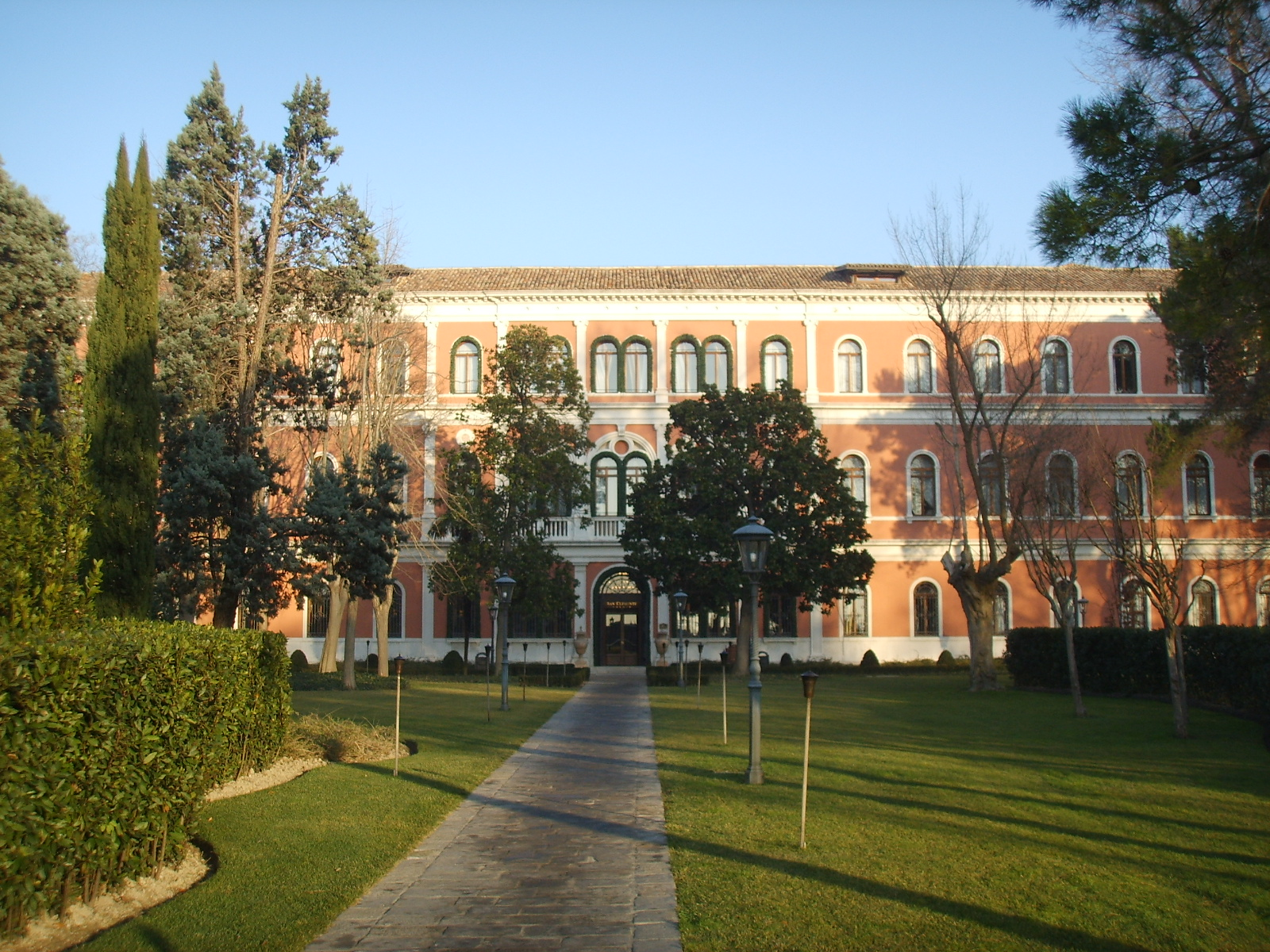 Isola di san clemente, view